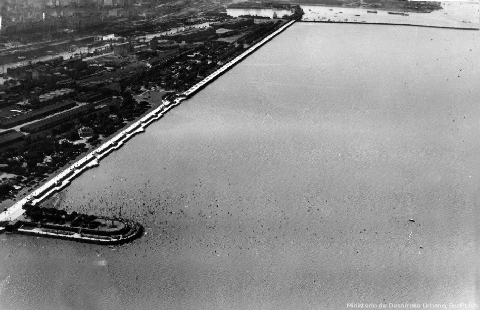 Vista aérea de Puerto Madero y el Balneario Costanera Sur en funcionamiento, con el Espigón Plus Ultra lleno de gente.